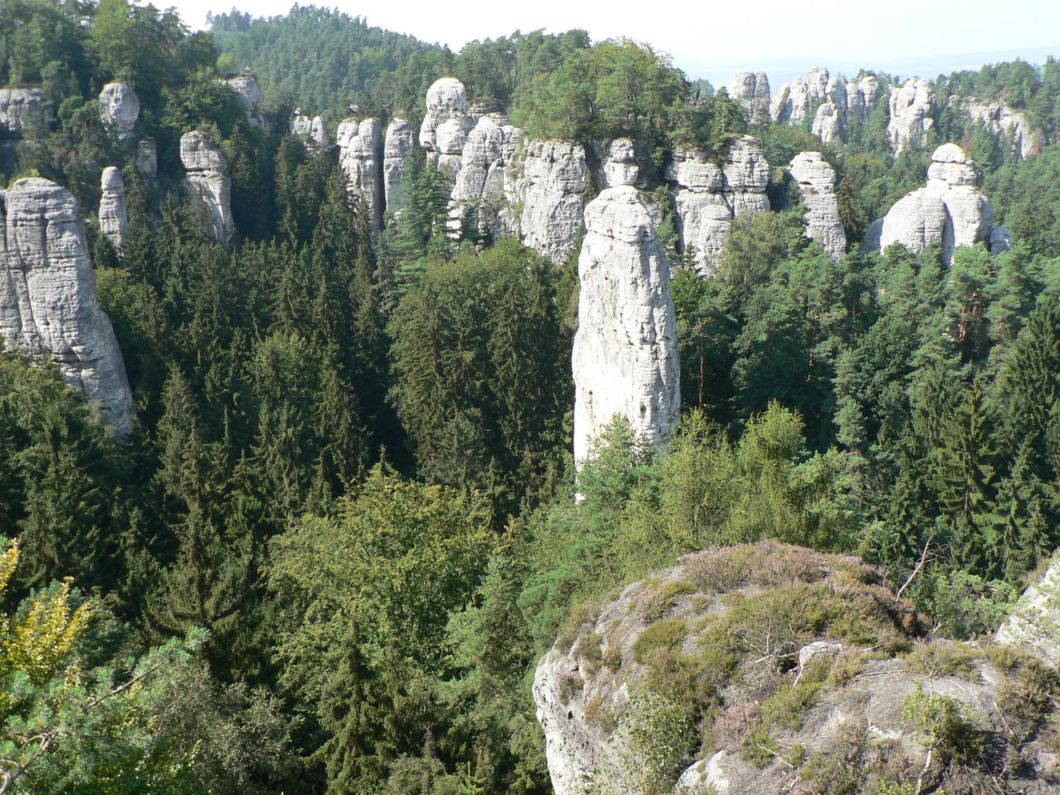 Hruboskalské skalní město, vyhlídka na skalní útvar Kapelník z "Vyhlídky na Kapelu".